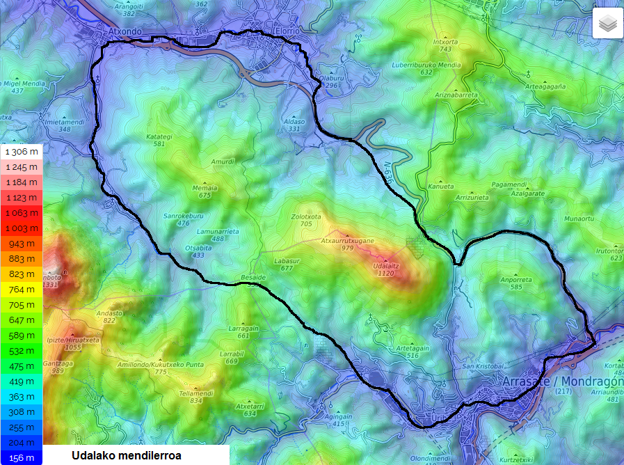 Udalako mendilerroaren mapa topografikoa.